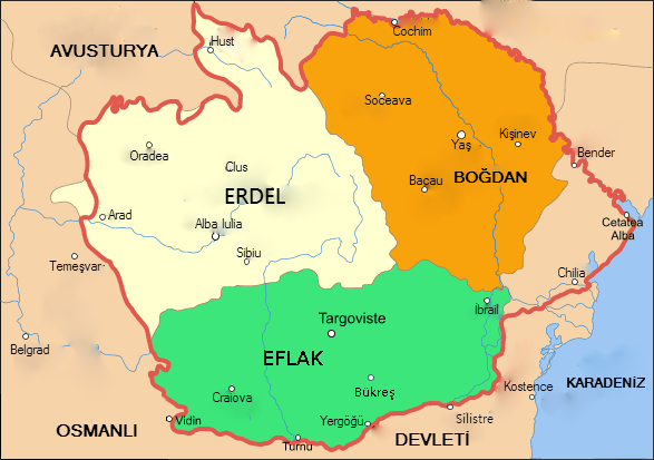 Memleketeyn (Eflak & Boğdan) Haritası